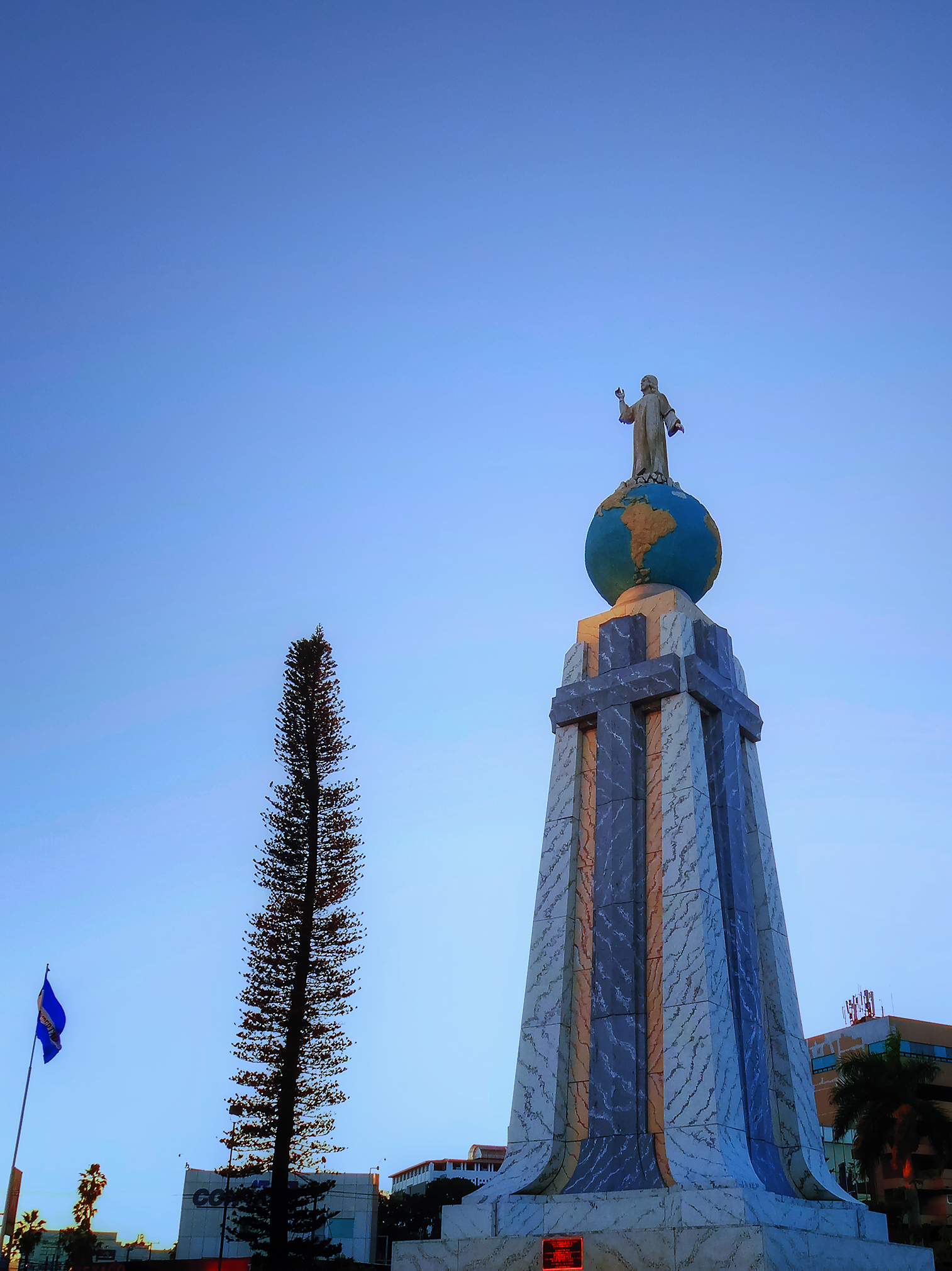 Monumento en Honor al Divino Salvador del Mundo